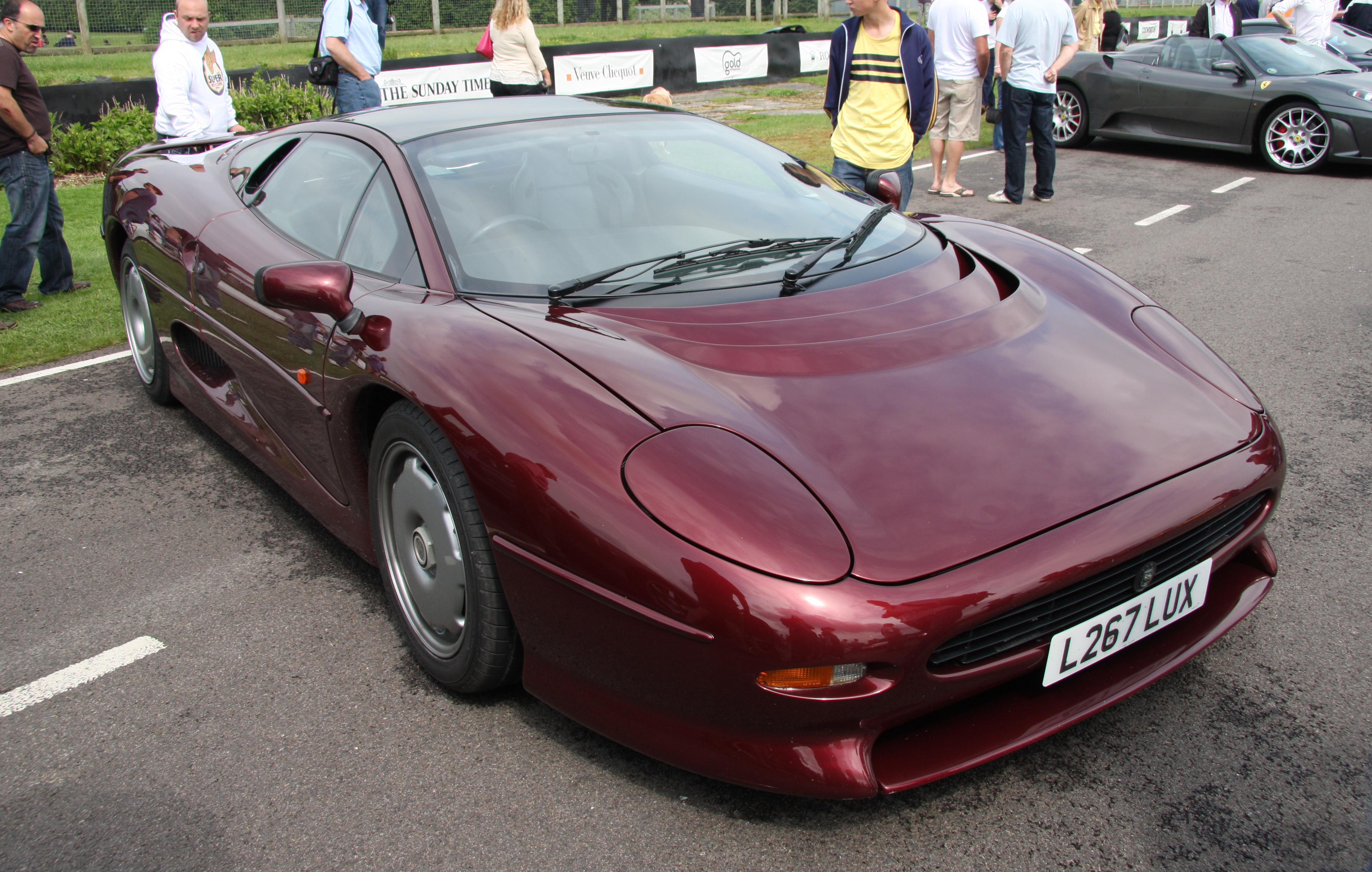 Jaguar XJ 220